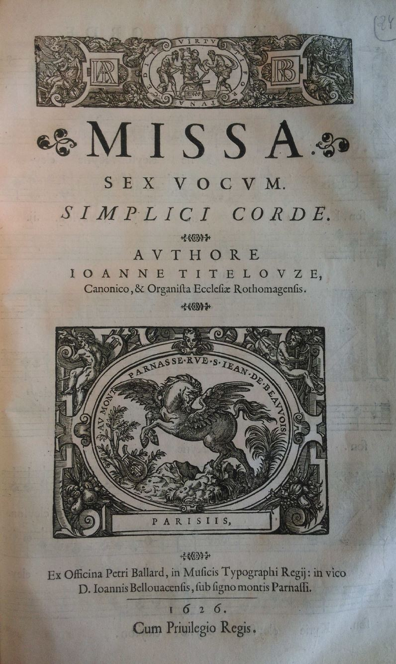 Title page of Titelouze Missa Simplici corde, 1626 (Paris BIC)